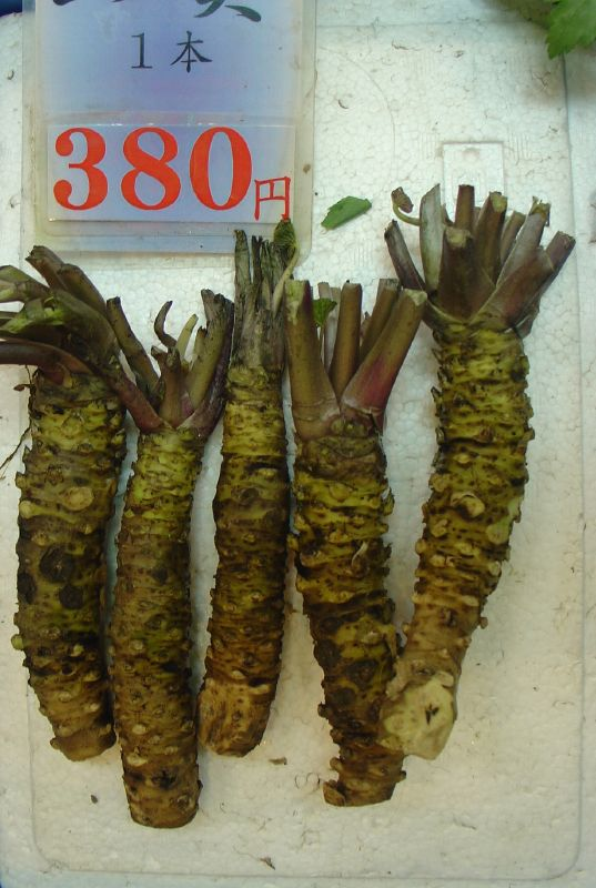 Wasabi